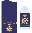 oficial1